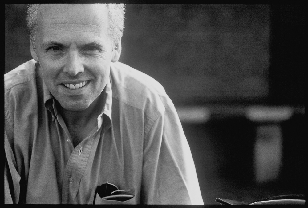 Der Licht- und Industriedesigner Tom Schlotfeldt